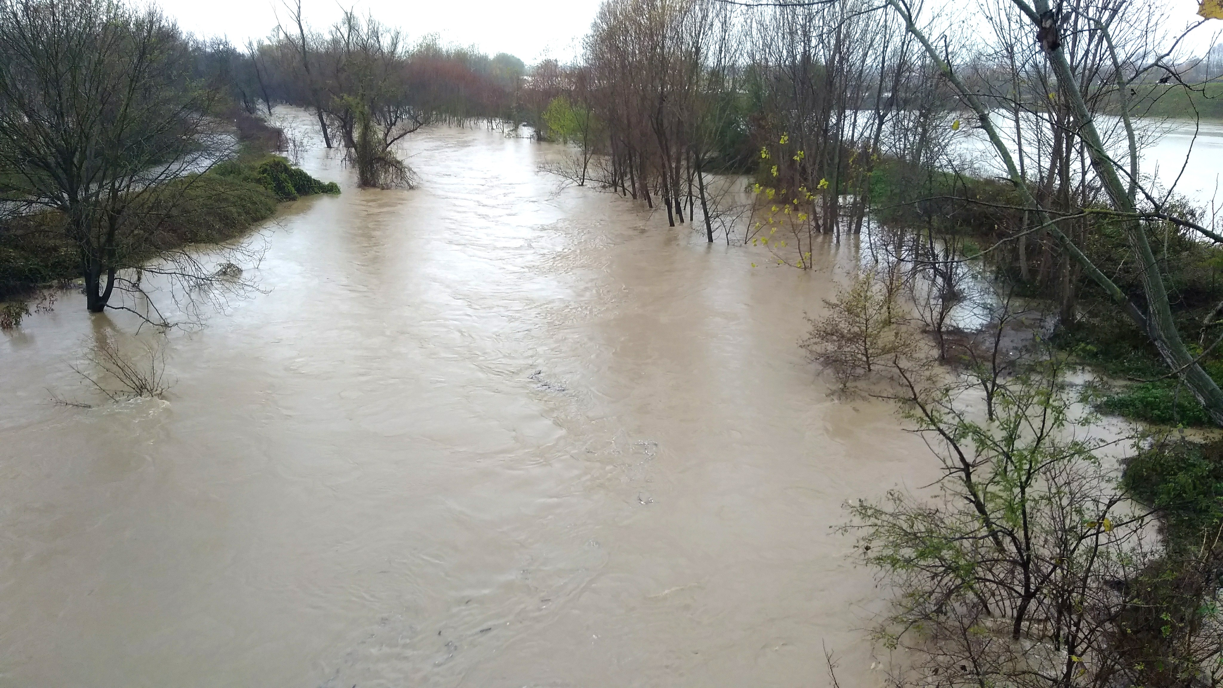 Il Chisola esondato presso La Loggia - 24 novembre 2019